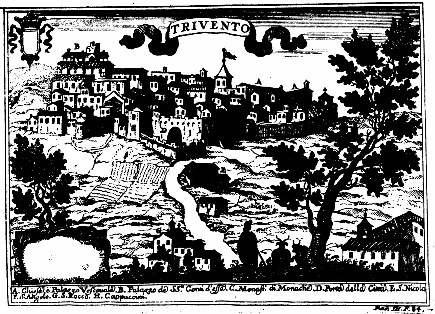 Disegno settecentesco di Trivento